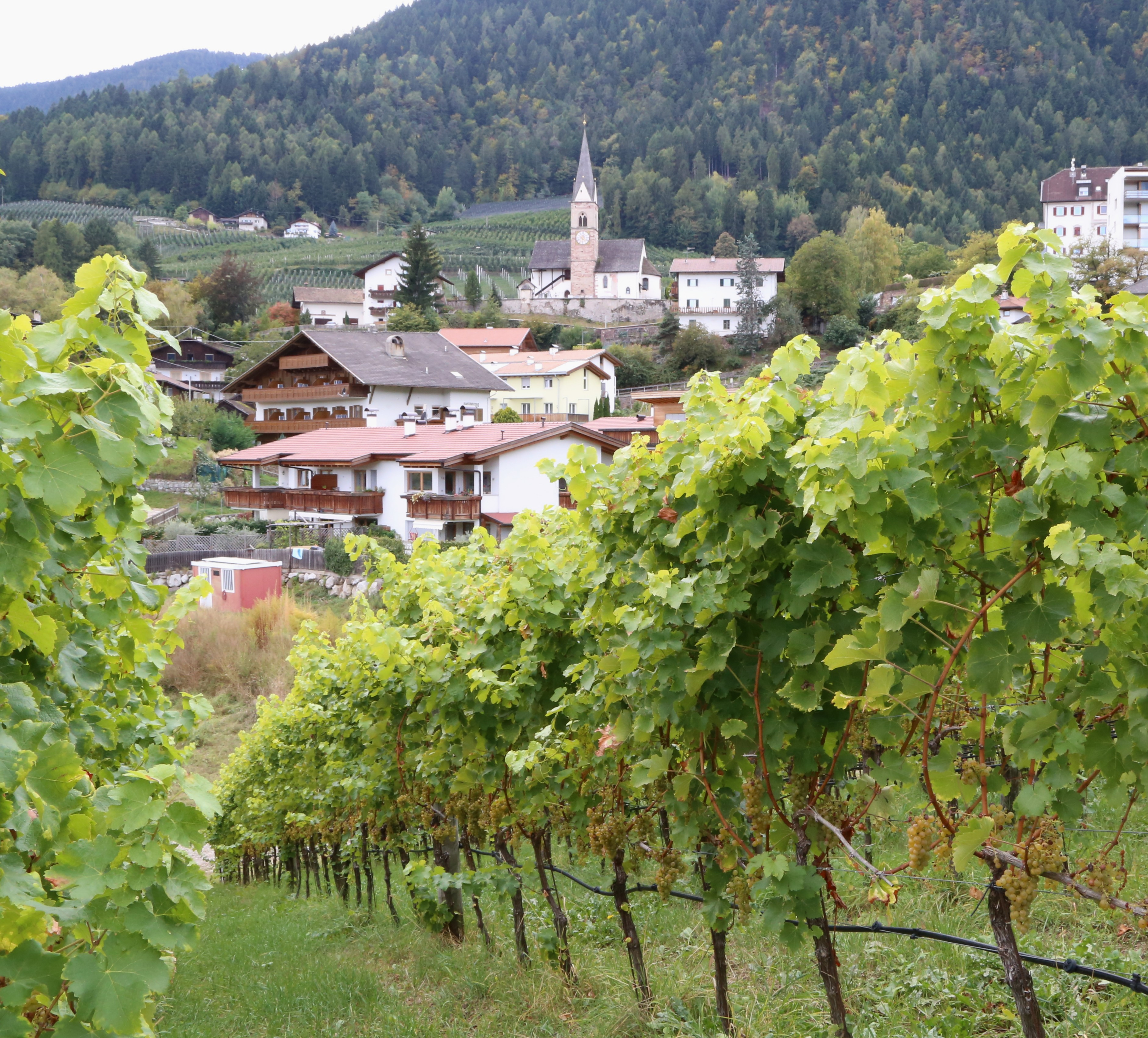 Völlan und die Pfarrkirche St. Severin, Gemeinde Lana